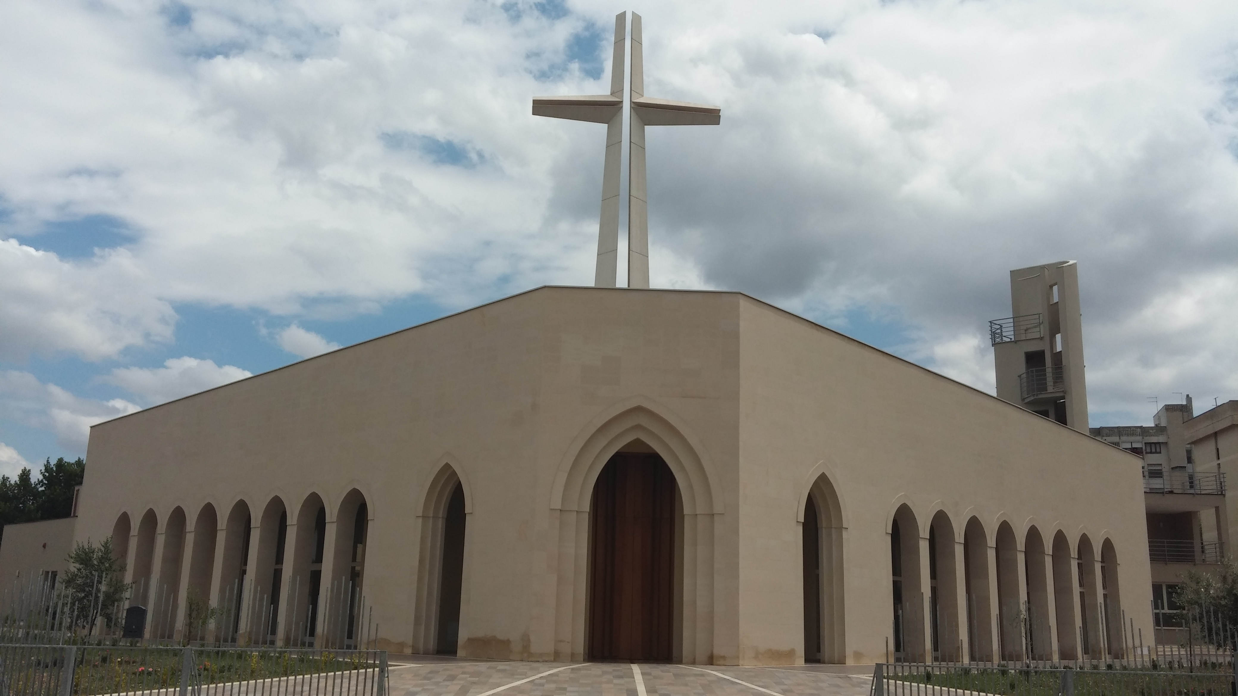 Parrocchia Santi Patroni d'Italia, frontale